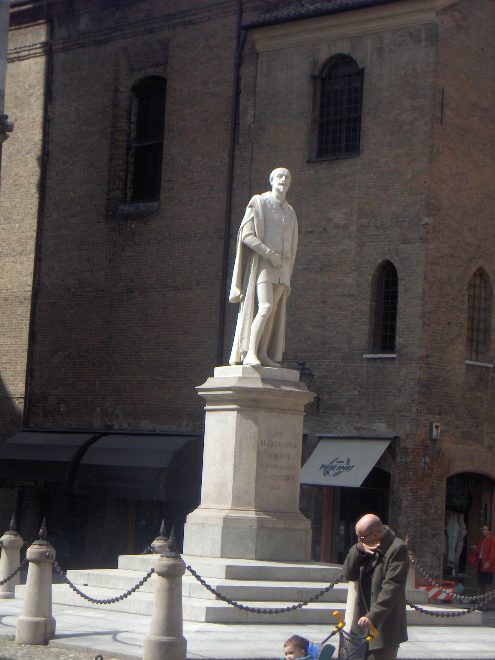 Alessandro Tassoni monument, below the Ghirlandina This is a photo of a monument which is part of cultural heritage of Italy.